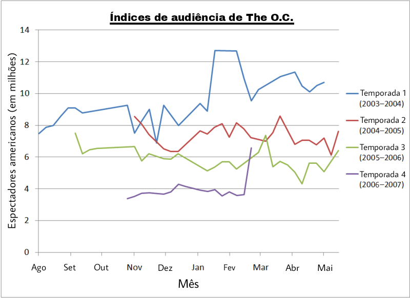 Português do Brasil: Gráfico de linhas de índices de audiência de The O.C. traçado contra meses. Uma linha diferente é usada para cada temporada.